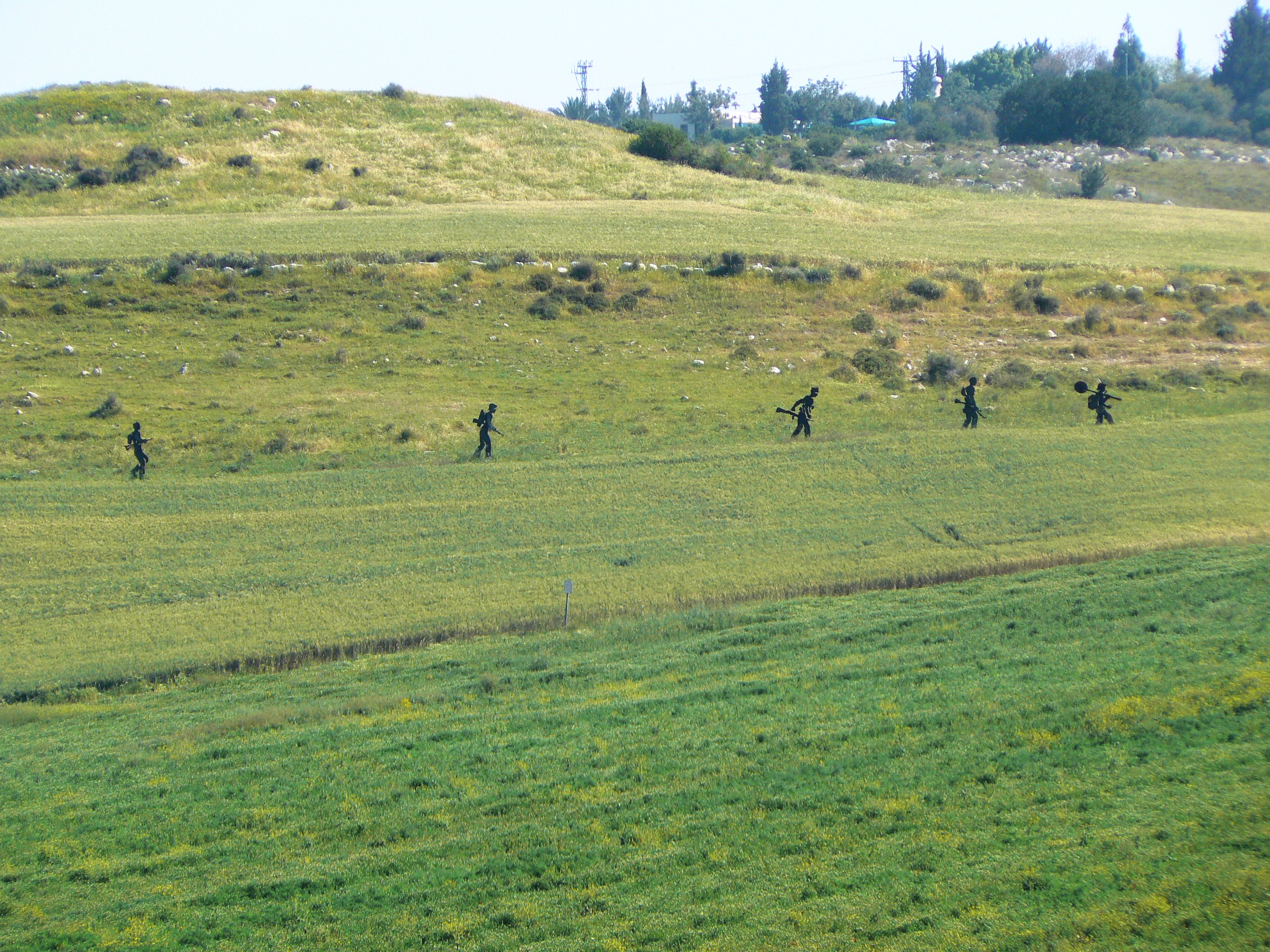 דמויות חיילי תש"ח לצד דרך הגבורה